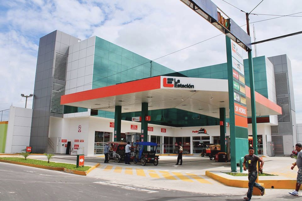 Foto de la estación en Iquitos